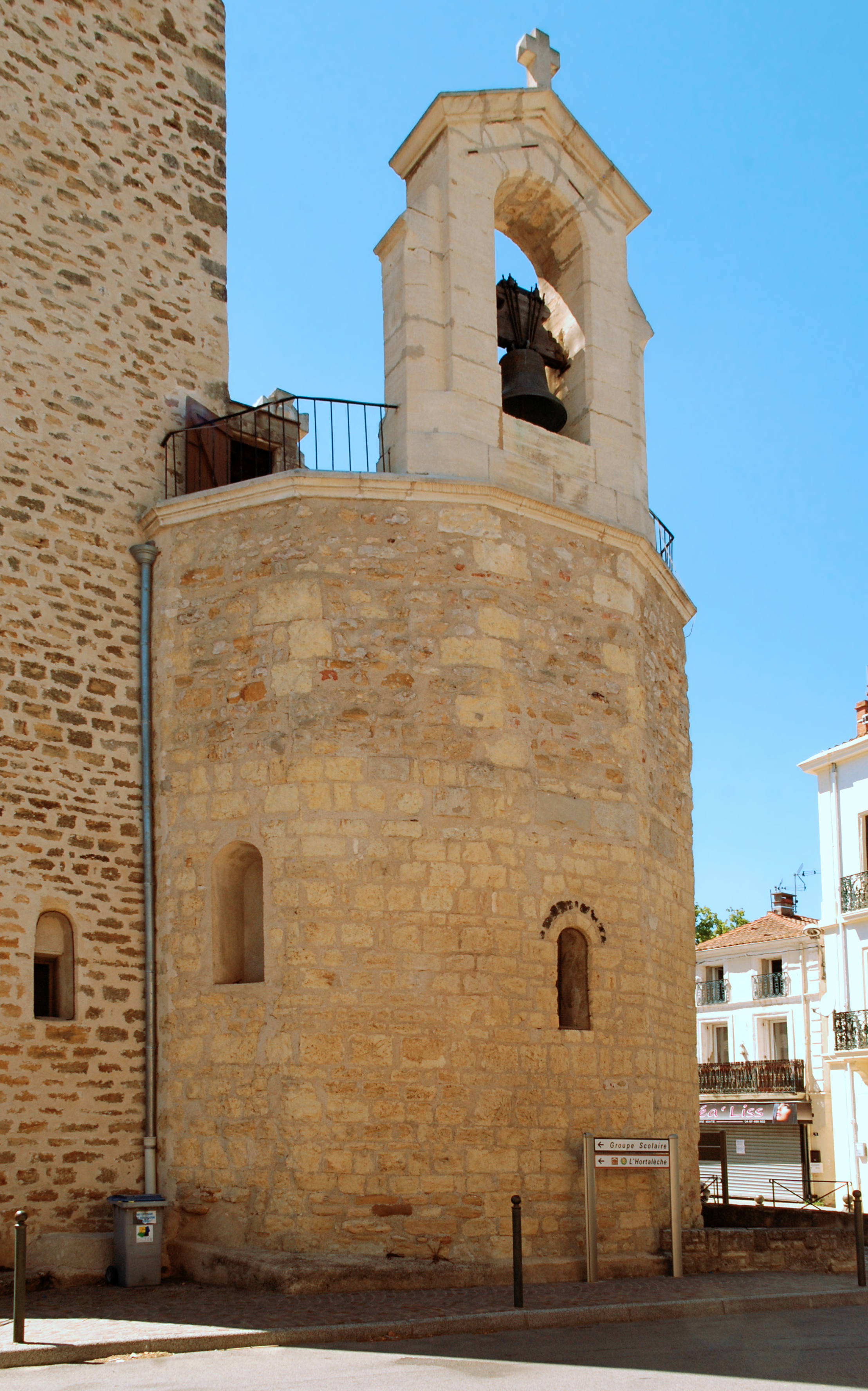 France - Languedoc - Hérault - Lieuran-lès-Béziers - église Saint-Martin